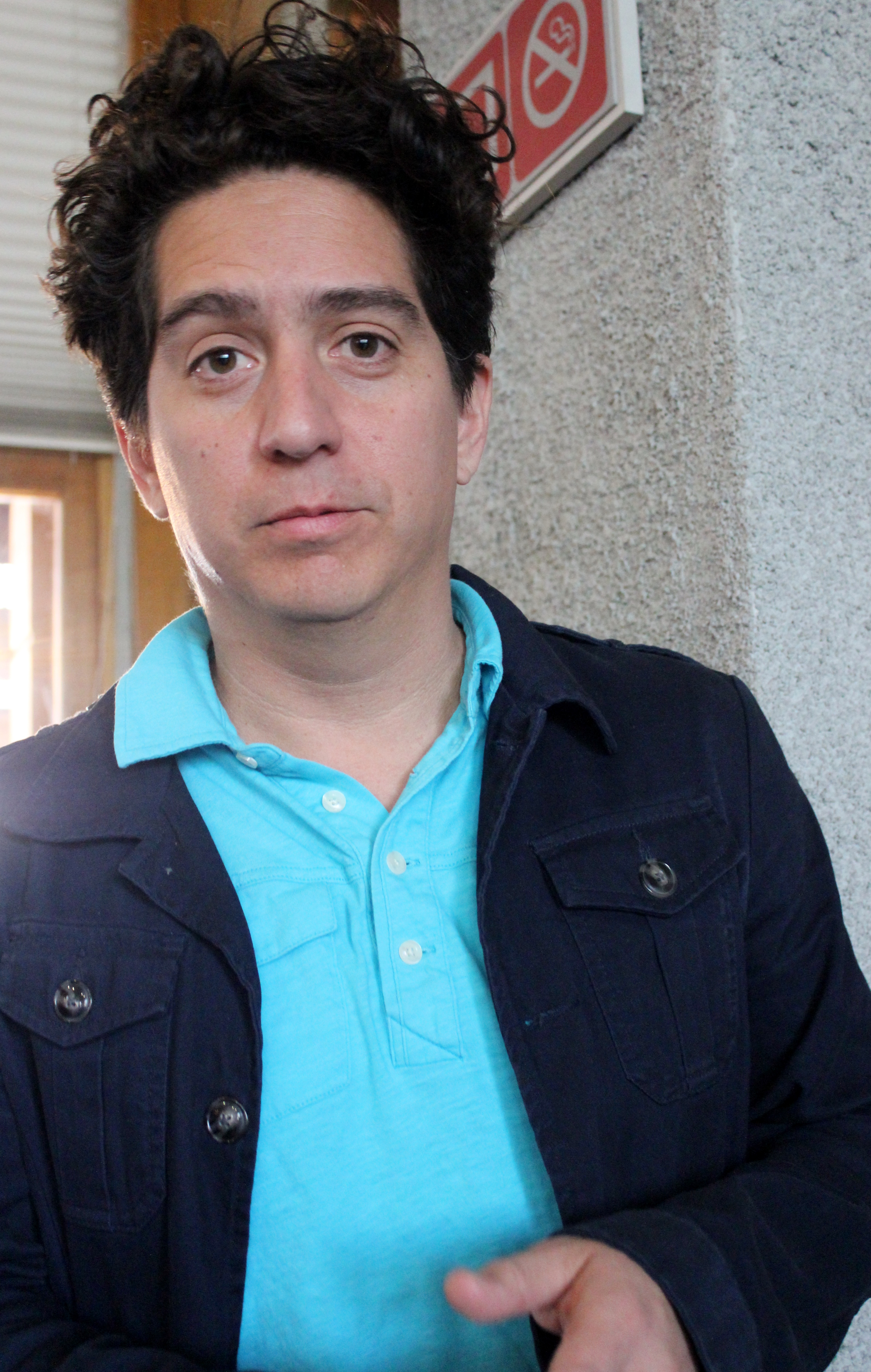 El escritor peruano-estaodunidense Daniel Alarcón en la Feria Internacional del Libro de Santiago 2018.